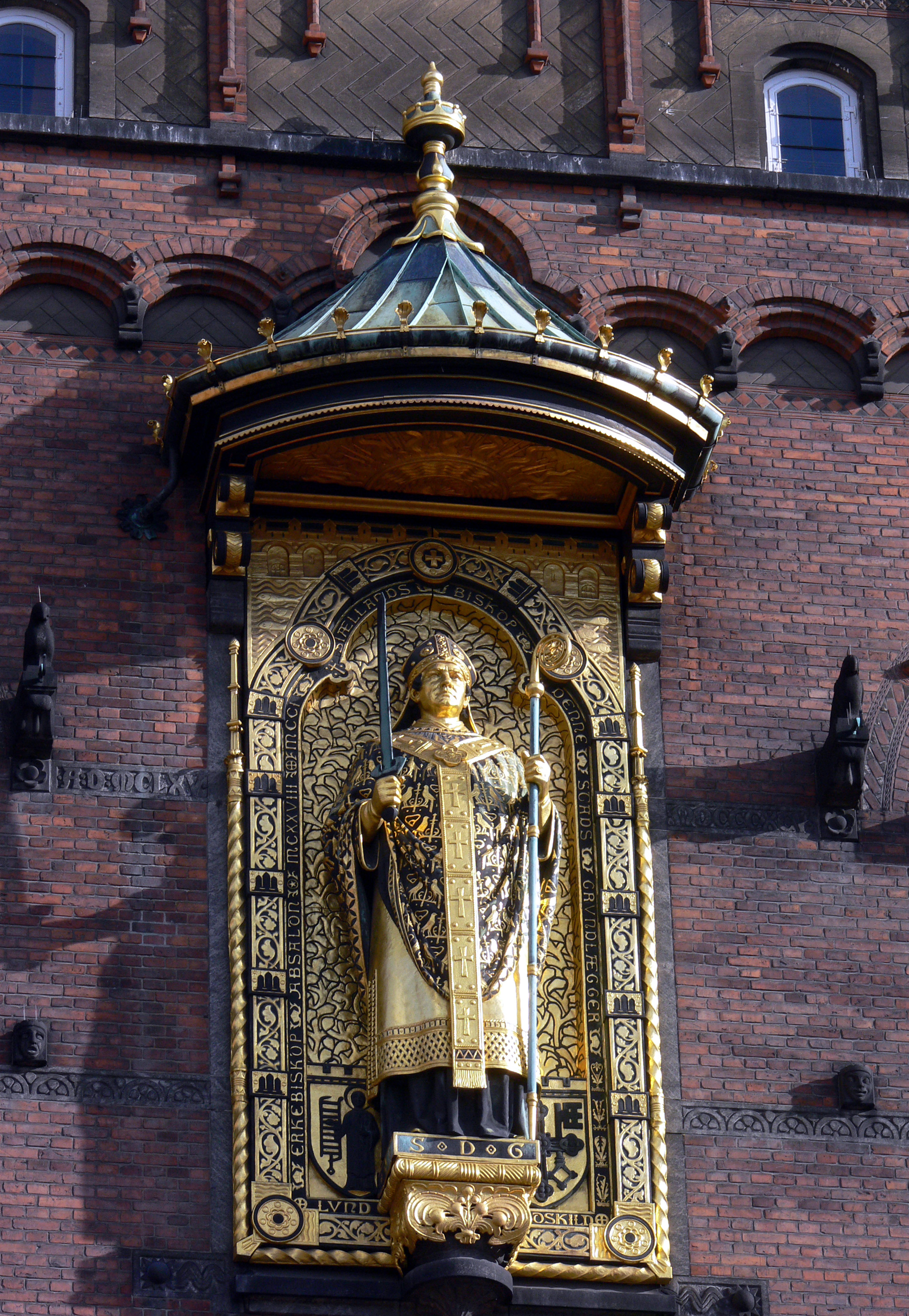 Bischof Absalon am Rathaus von Kopenhagen